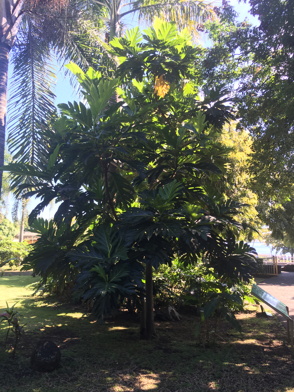 arbre à pain du Capitaine Bligh